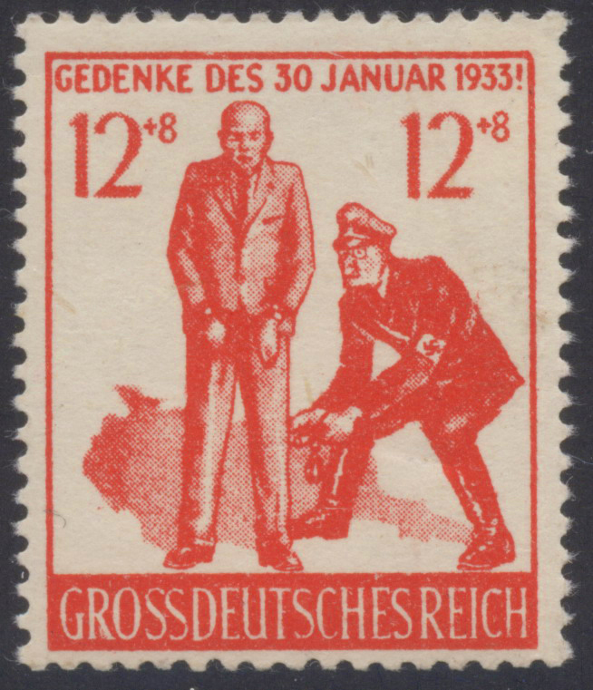 Britische Propagandafälschung für Deutschland, 1944. "Himmler fesselt Zivilisten".